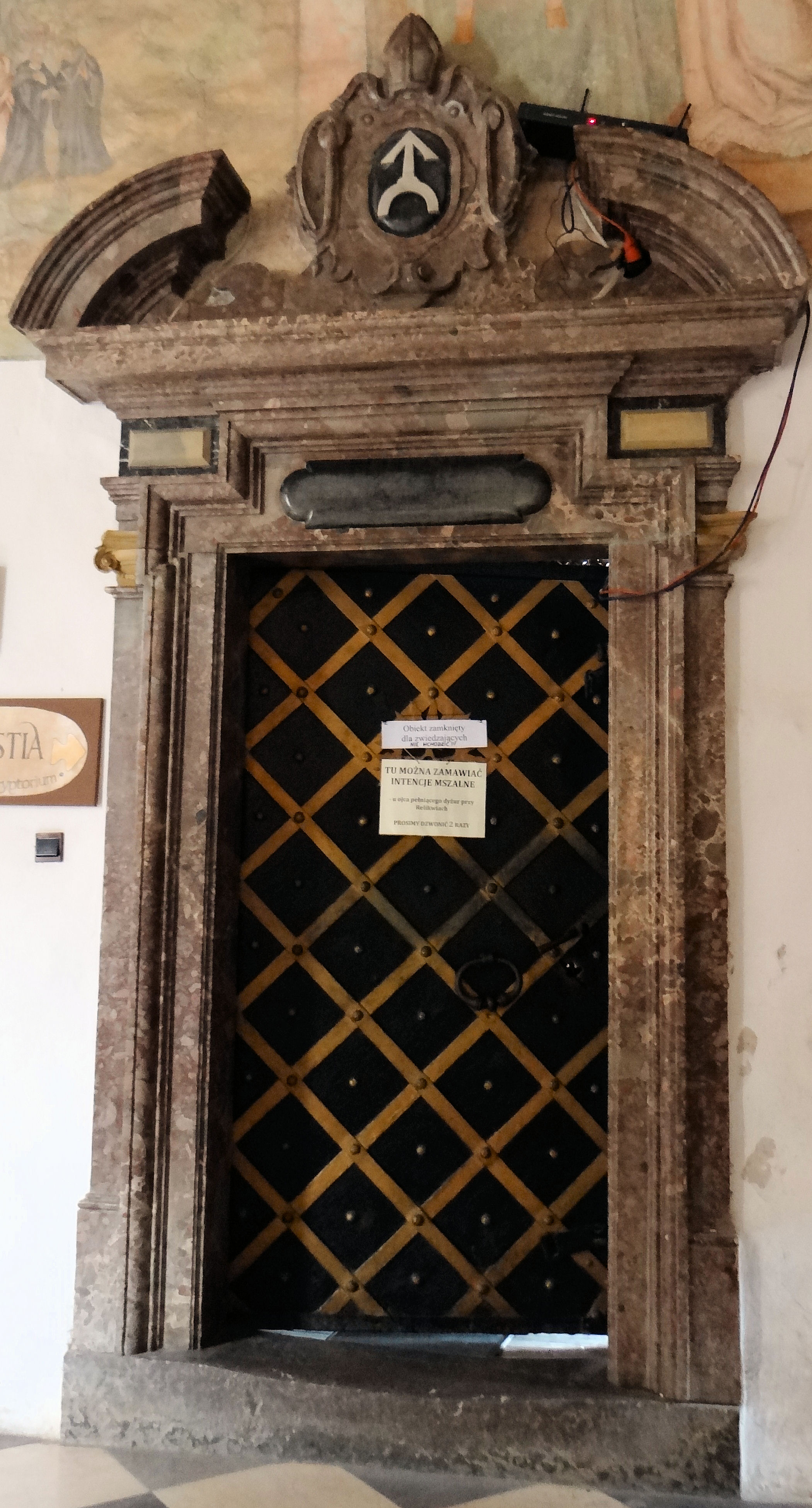 Sanktuarium Relikwii Drzewa Krzyża Świętego - ozdobny portal prowadzący do zakrystii